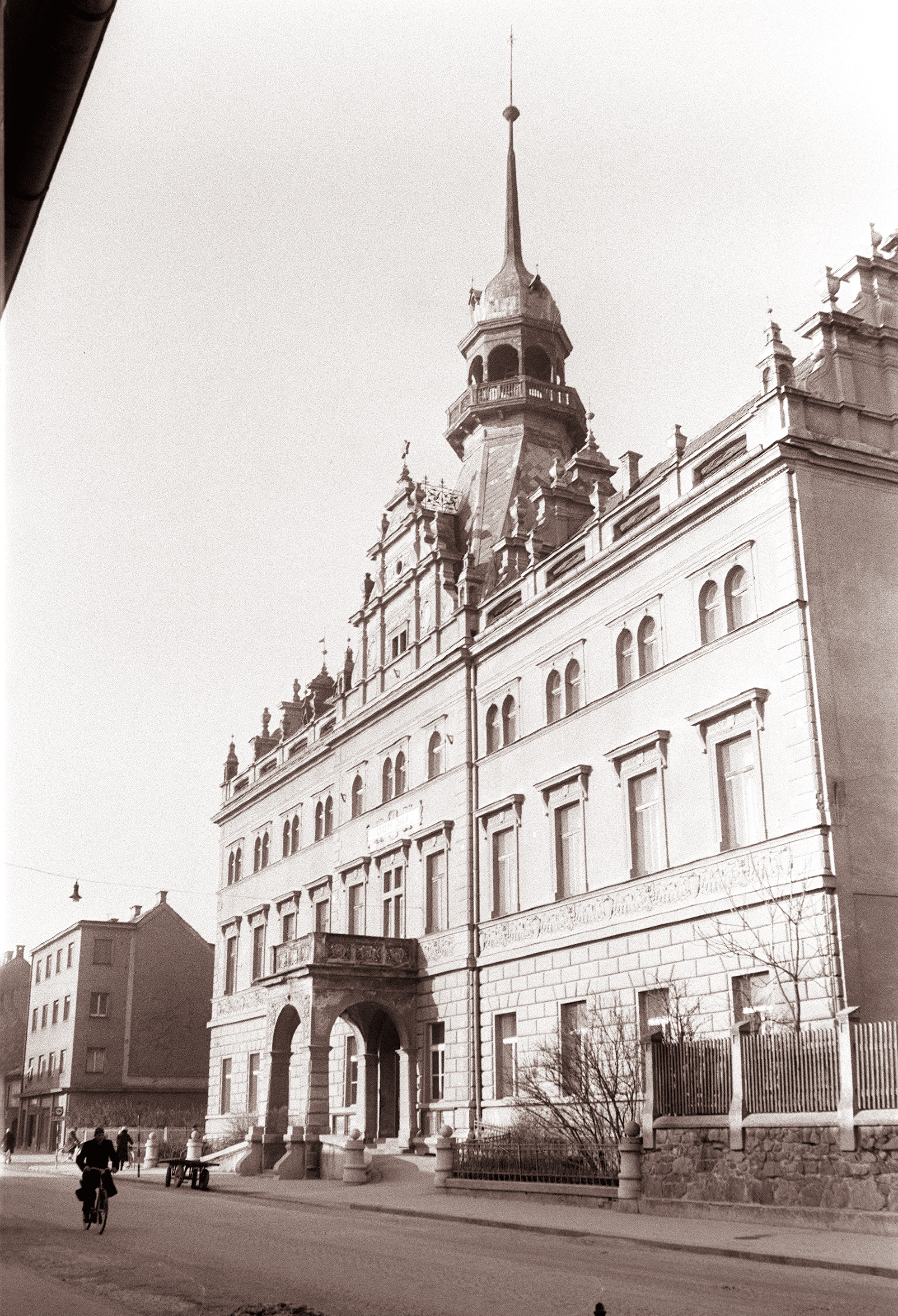 Narodni dom v Mariboru